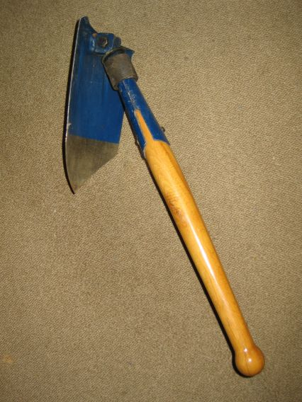 Klappspaten